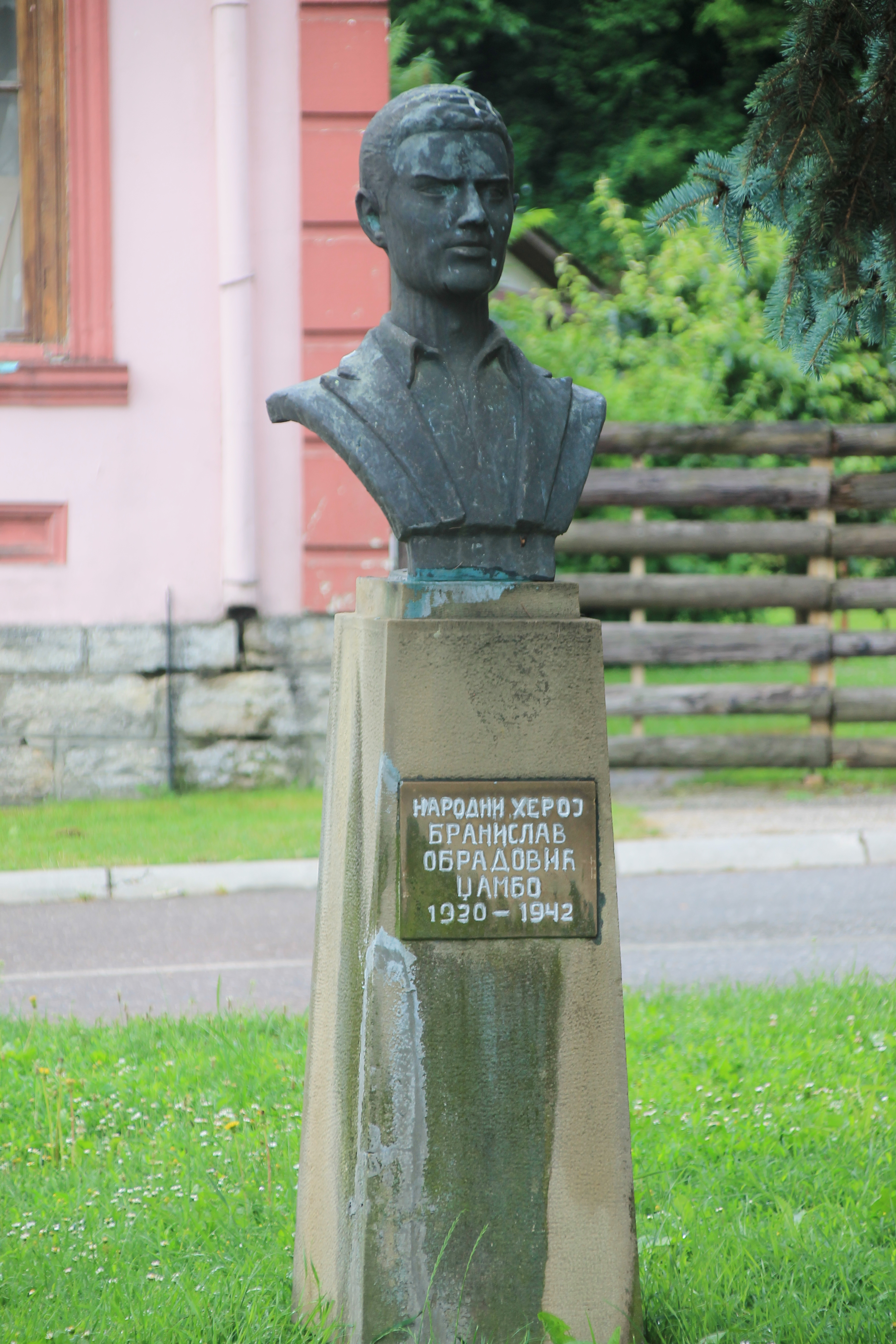 Guča (Srbija)